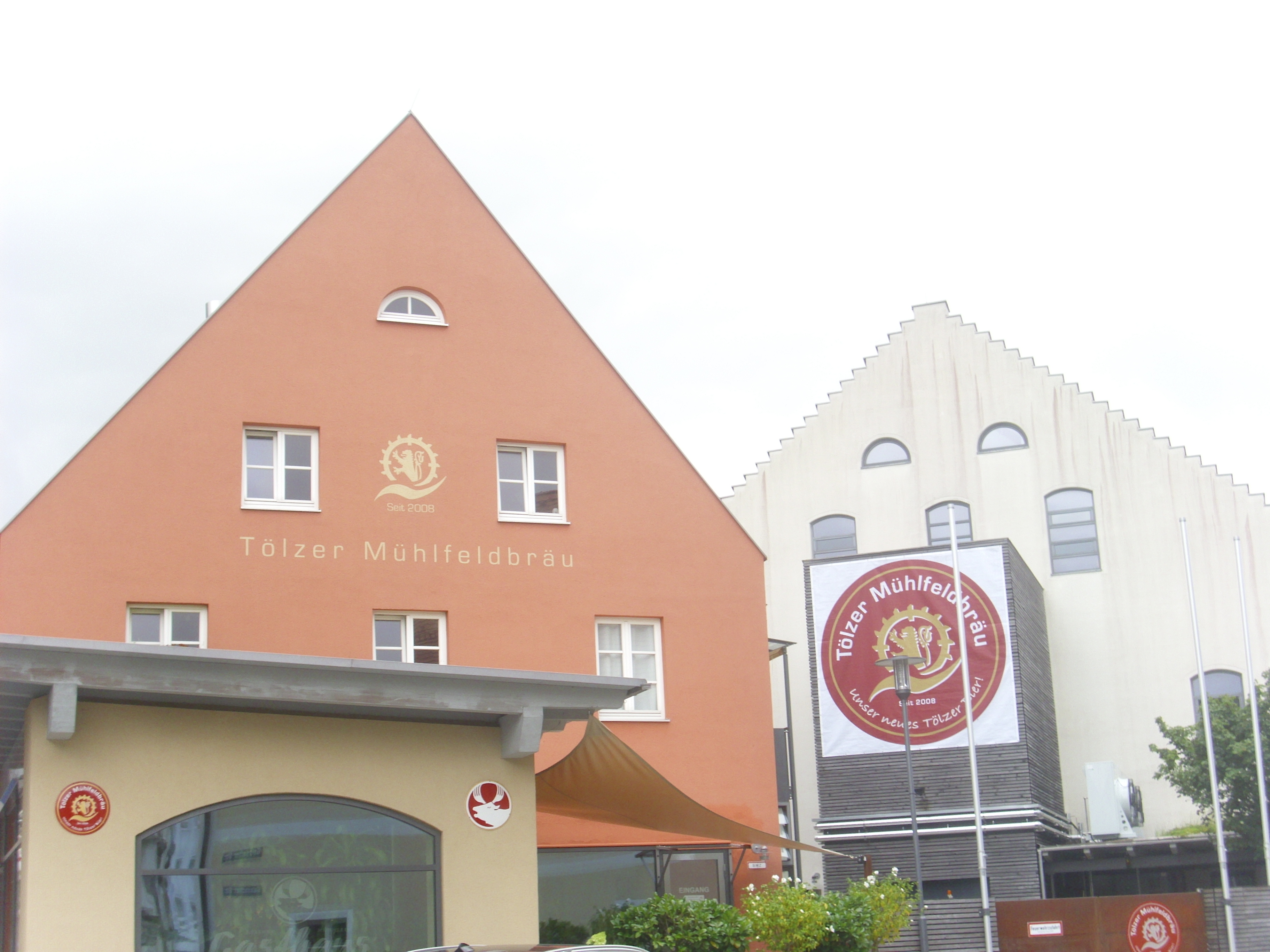 Außenansicht des Mühlfeldbräus in Tölz, im Hintergrund die ehemalige Grünerbrauerei